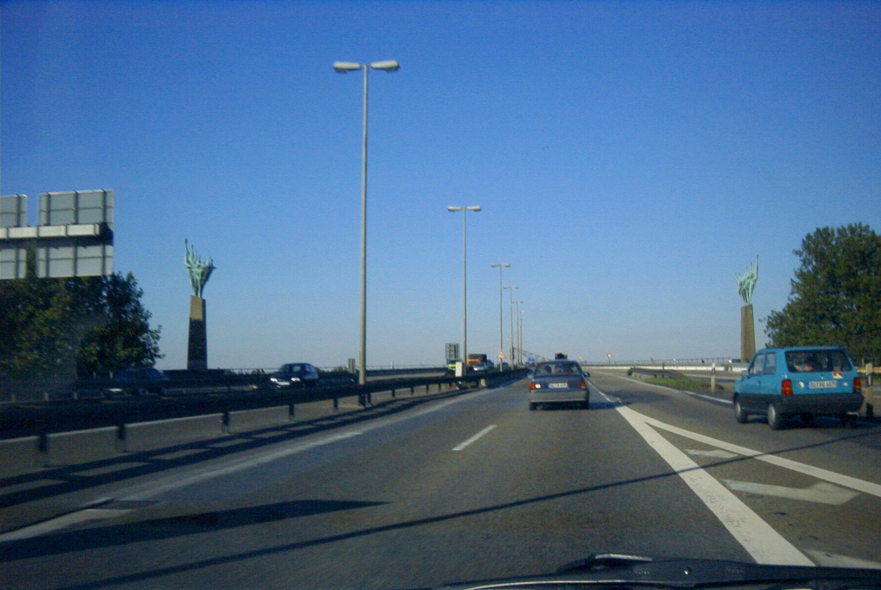 Ehemalige Doppelplastik „Begegnungen“ an der Berliner Brücke in Duisburg, 1999.(Nachdem die beiden 4,80 Meter hohen 5- und 7-köpfigen Skulpturen 2007 abmontiert wurden, weil deren Sockel beschädigt waren, trennten Metalldiebe im Mai 2008 am städtischen Bauhof in Walsum-Aldenrade von beiden Skulpturen jeweils die drei größten Köpfe ab. Erschaffen wurden die Skulpturen von der Berliner Bildhauerin Ursula Hanke-Förster im Jahre 1954. Die offizielle Einweihung auf der Berliner Brücke wurde 1963 von Willy Brandt vorgenommen. Im September 2015 kehrte die restaurierte Skulpturengruppe nahe dem ehemaligen Standort auf die Berliner Brücke zurück.)